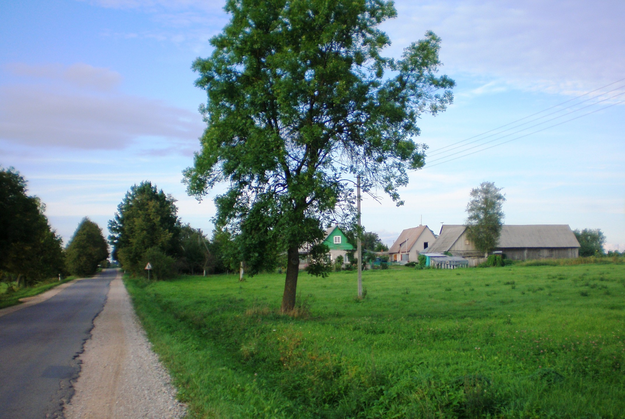 Kruopiai, Kėdainių raj.